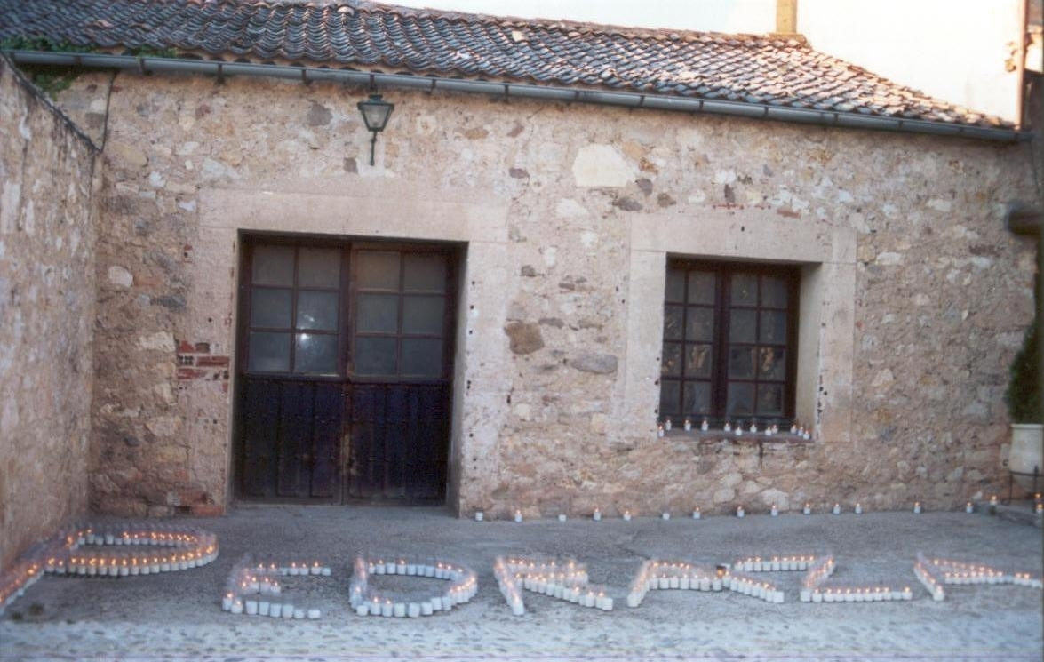 Pedraza (Segovia) durante la noche de las velas (Junio). Autor: Fev. Fecha Junio 2002